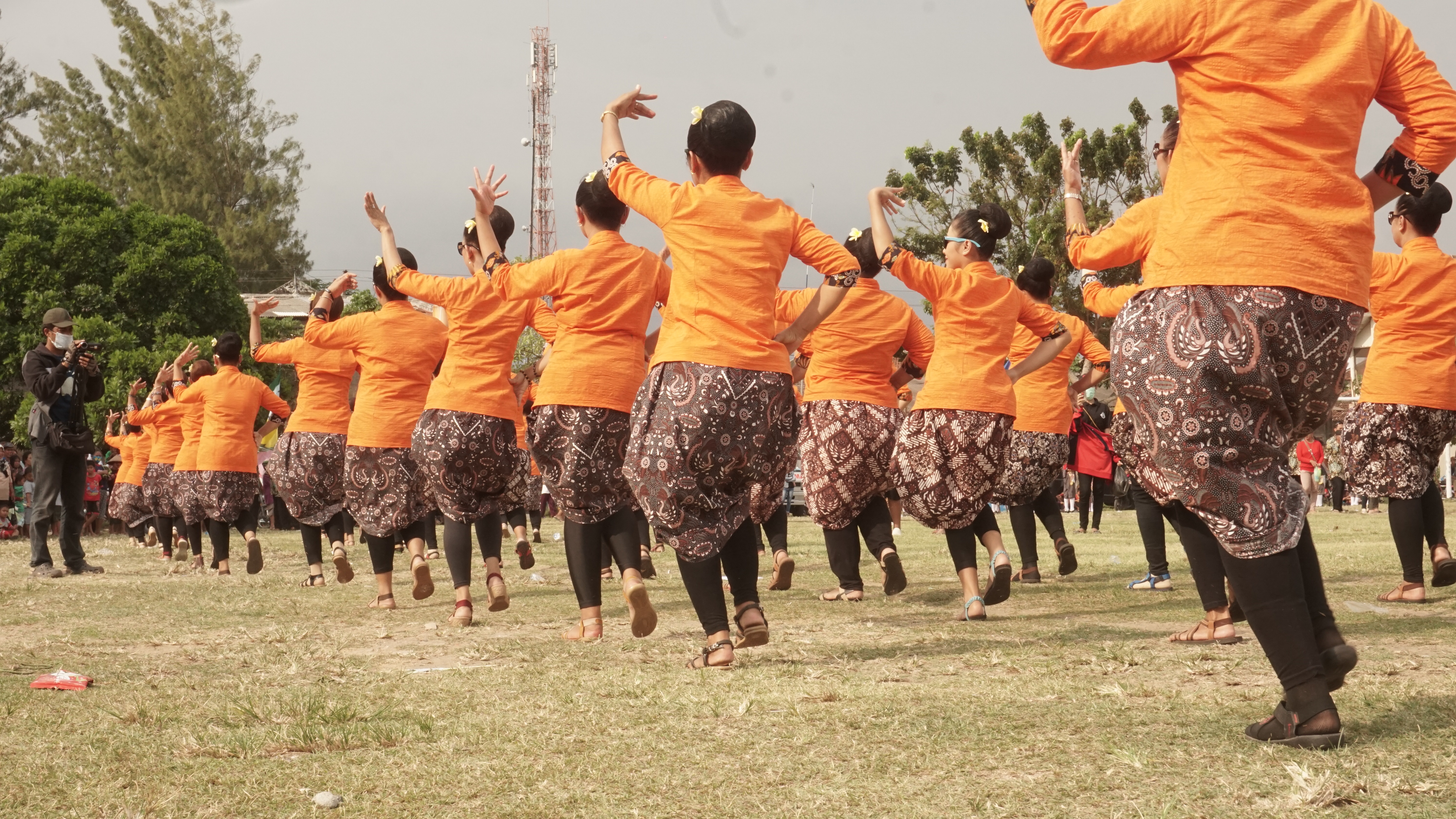 Puluhan penari beraksi di depan para juri pada Festival Kirab Budaya di desa Sumbermulyo